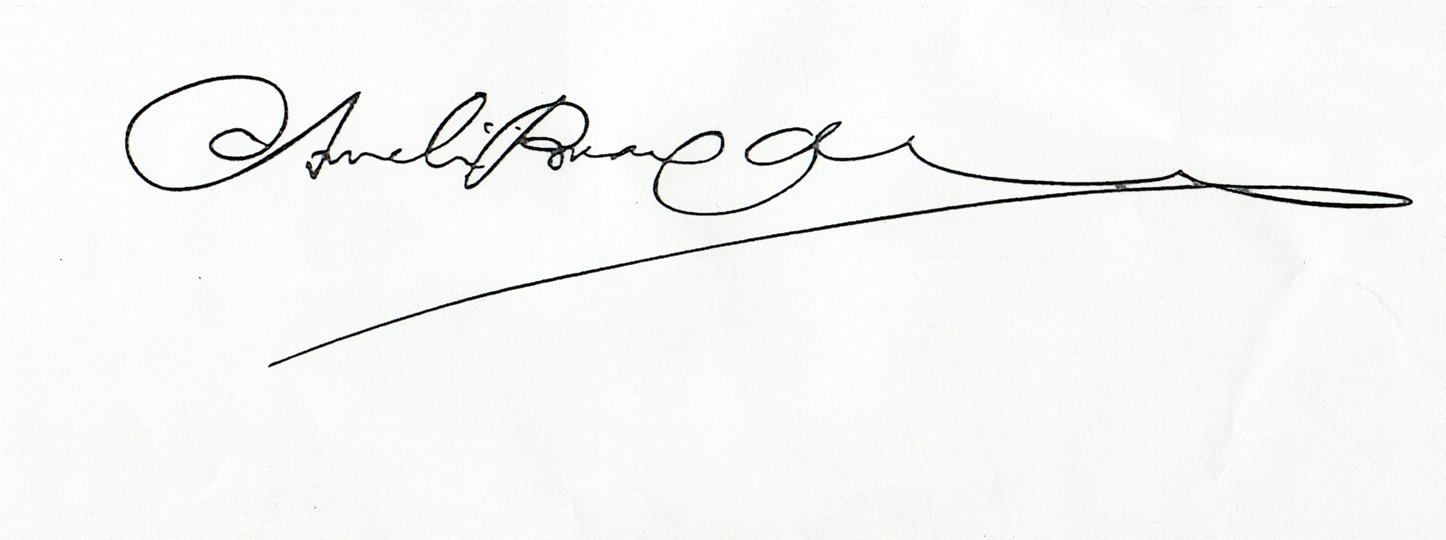 Assinatura em feitura gráfica do dicionarista Aurélio Buarque de Holanda Ferreia, autor do Dicionário Aurélio de Língua Portuguesa.